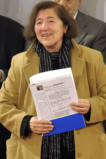 08-06-2012 Entrega de pensiones de gracia a destacados folcloristas chilenos